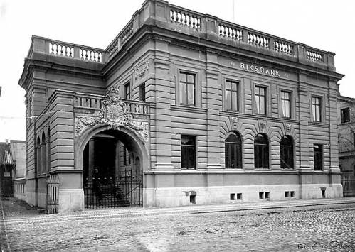 Riksbankshuset i Karlstad före ombyggnad